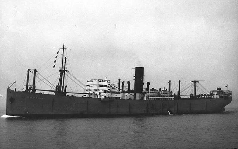 Der Frachter Gaelic Prince der Prince Lines